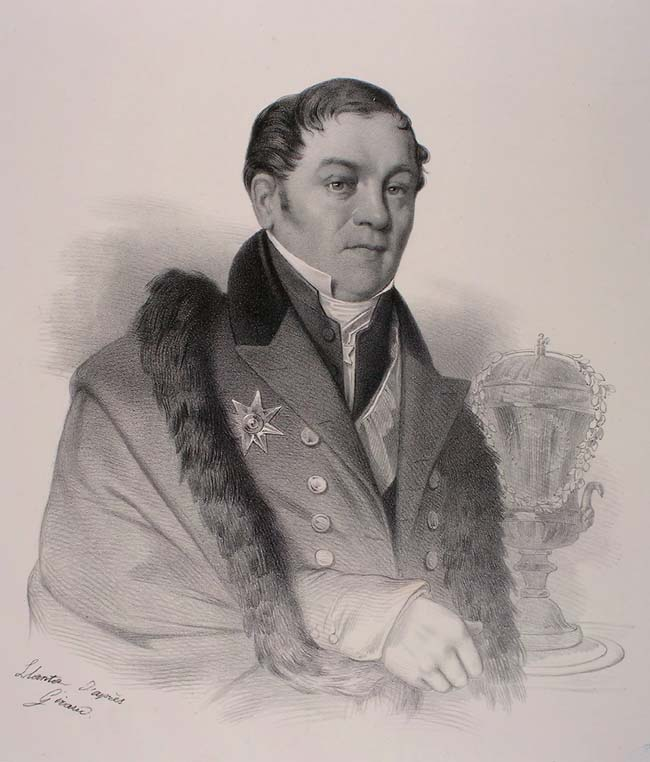 Subject : Johann Fischer von Waldheim (1771-1853), German naturalist.